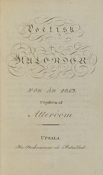 Poetisk kalender, title page